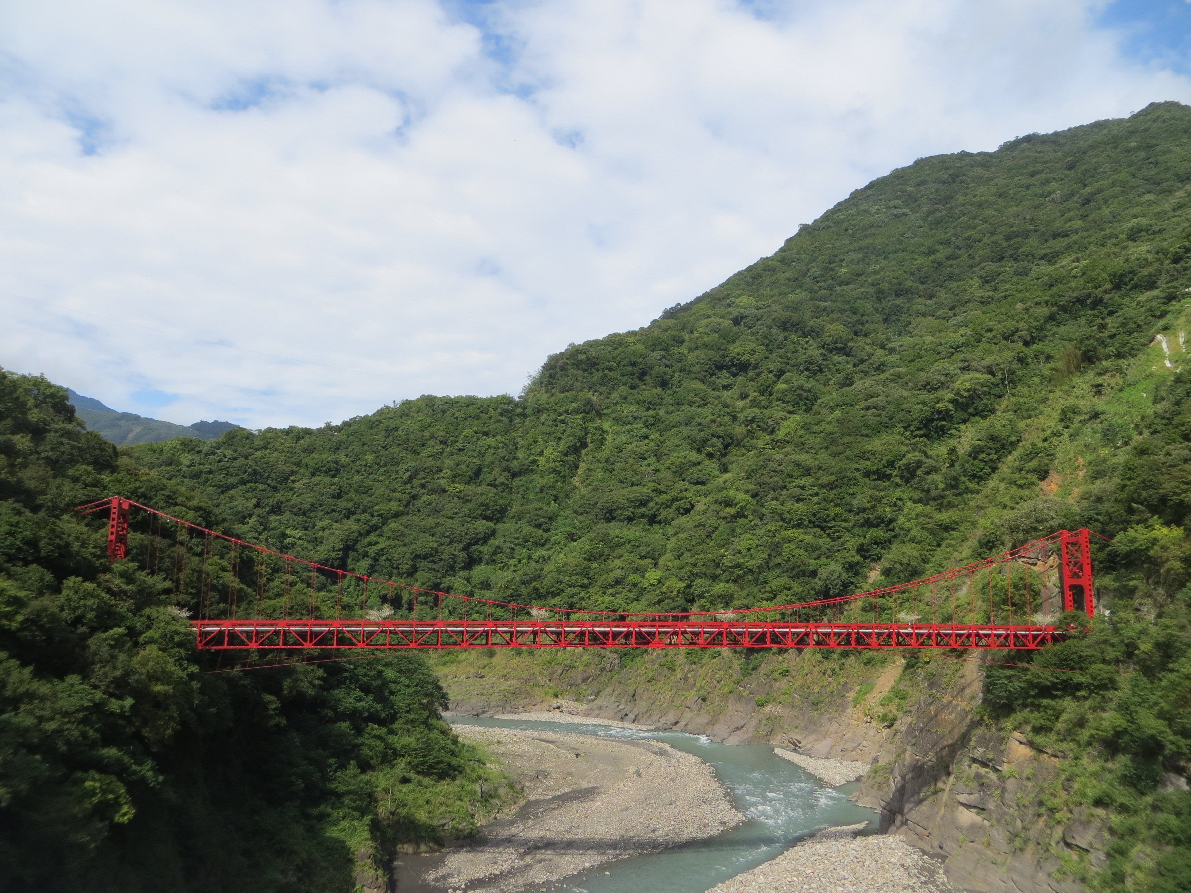 2014年8月13日早晨，自巴陵大橋看舊巴陵橋側面，可見其結合了吊橋、鋼樑橋的形式。